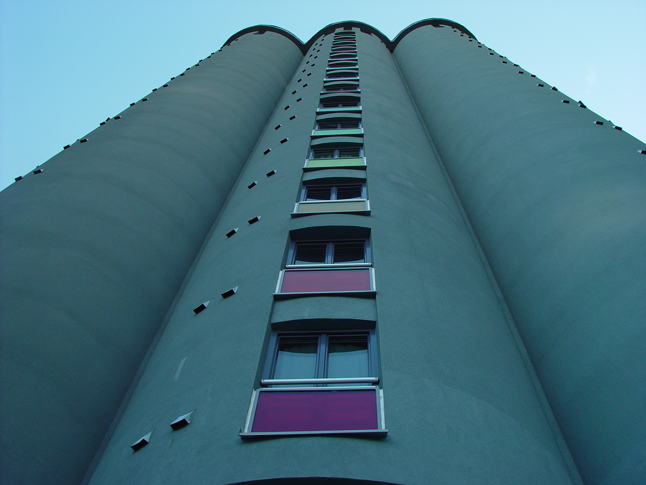 Grünerløkka Studenthus